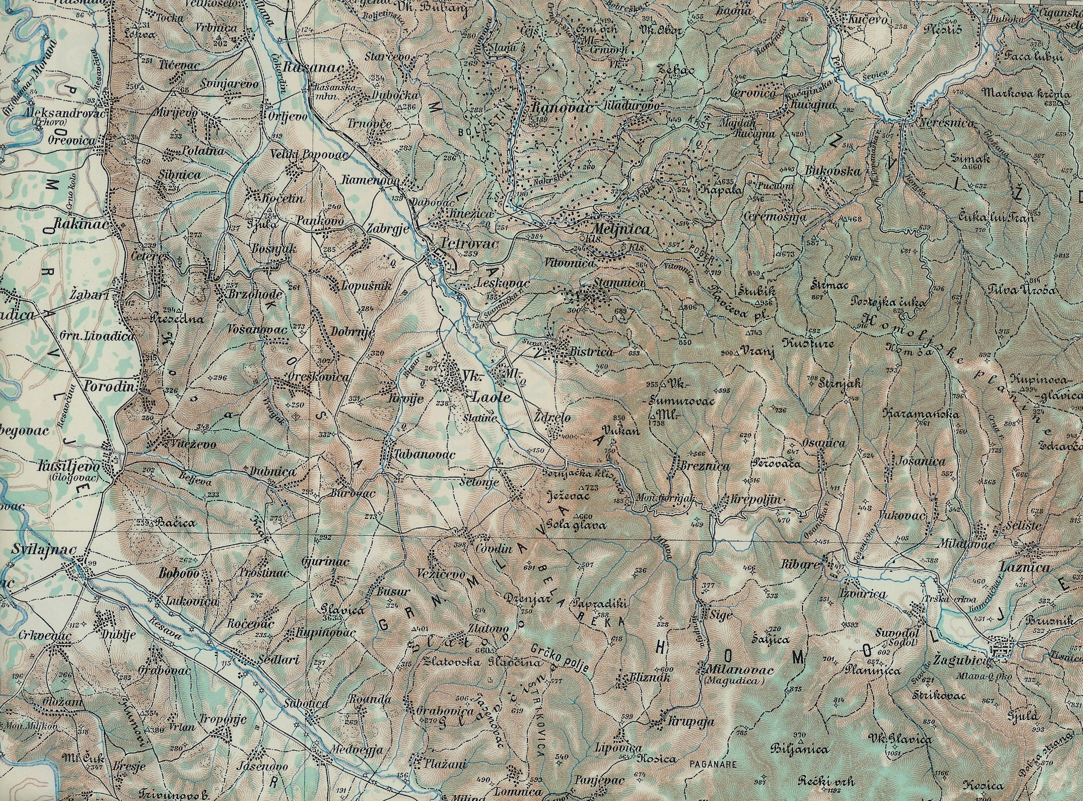 Der Westen von Laznica bis zur Moldava